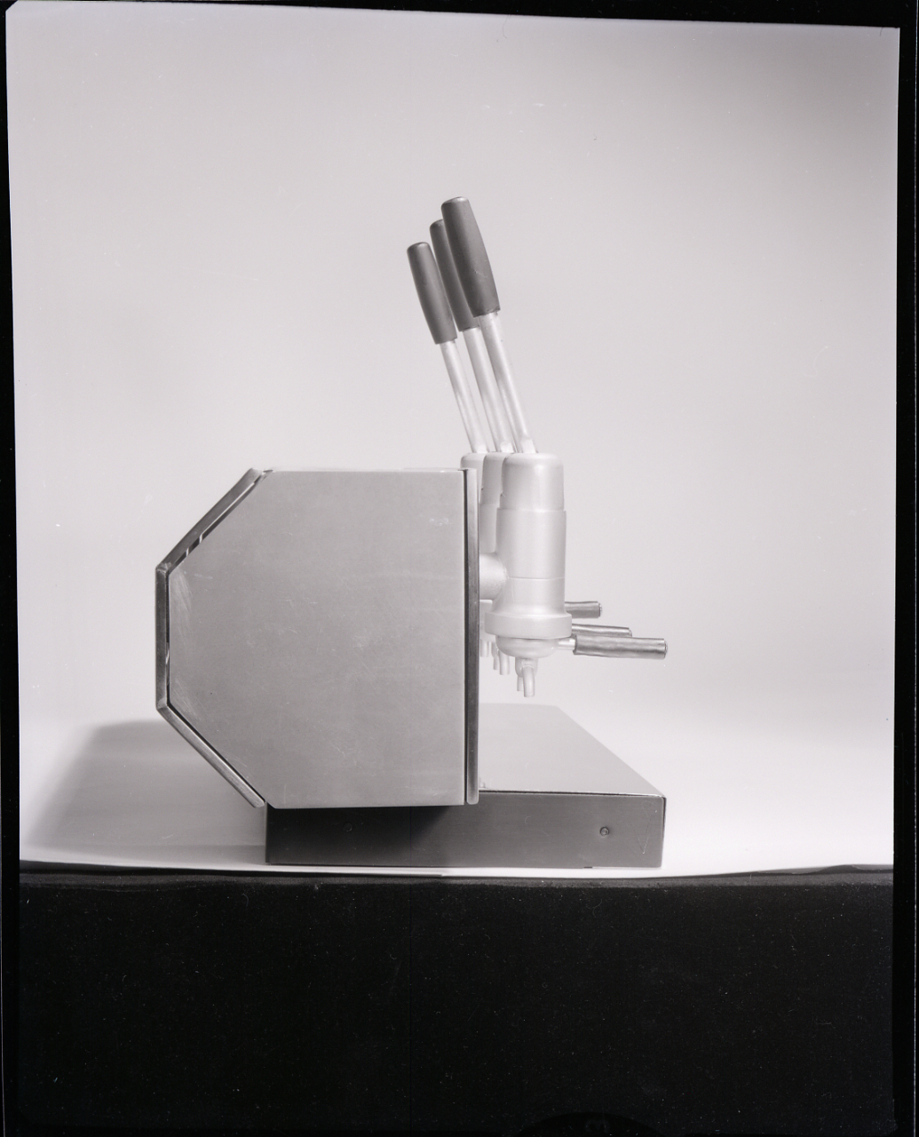 Macchina per il caffè Brasilia, nata nel 1961 dalla collaborazione di Alberto Rosselli con Angelo Tito Anselmi.[1] Servizio fotografico : Italia, 1975 / Paolo Monti. - Buste: 3, Fototipi: 6 : Negativo b/n, gelatina bromuro d'argento/ pellicola ; 10x12. - ((Serie costituita da 6 negativi identificati con i nn.: 20263-20268. Numerazione parallela: 18-20. La suddetta serie è contenuta nella scatola identificata con la numerazione 20225/ 20268. Sulla scatola manoscritto con pennarello nero: "Arch. Anselmi". La scatola è a sua volta contenuta in una scatola grande col coperchio giallo. - , presso Archivio Paolo Monti. - Fonte: Rubrica di Paolo Monti: Archivio 10x12 (ultimi numerati) - dal G1 al (s.d.)